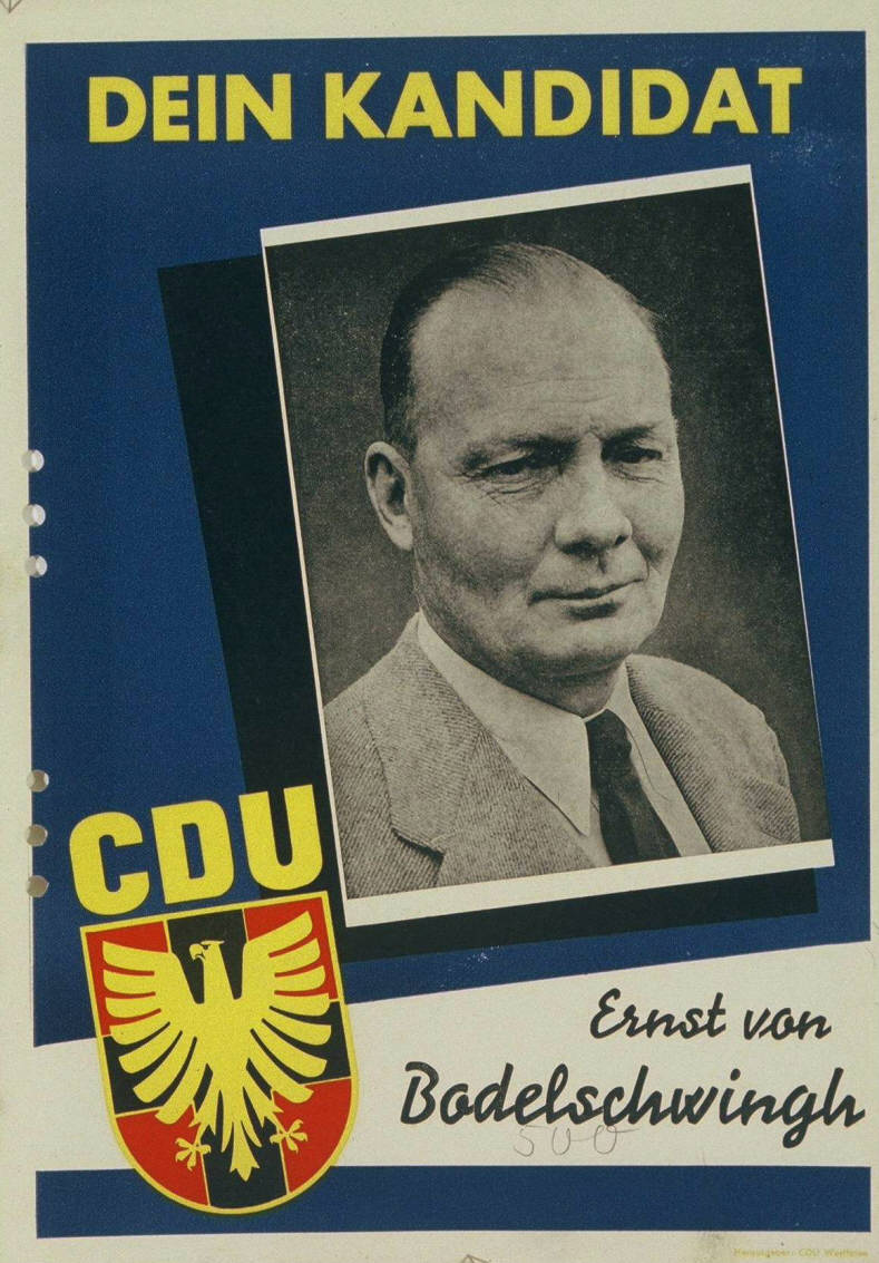 Dein Kandidat Abbildung: Porträtfoto Plakatart: Kandidaten-/Personenplakat mit Porträt Auftraggeber: CDU Westfalen Objekt-Signatur: 10-001: 741 Bestand: Plakate zu Bundestagswahlen (10-001) GliederungBestand10-18: Plakate zu Bundestagswahlen (10-001) » Die 3. Bundestagswahl am 15. September 1957 » CDU » Mit Porträtfoto Lizenz: KAS/ACDP 10-001: 741 CC-BY-SA 3.0 DE